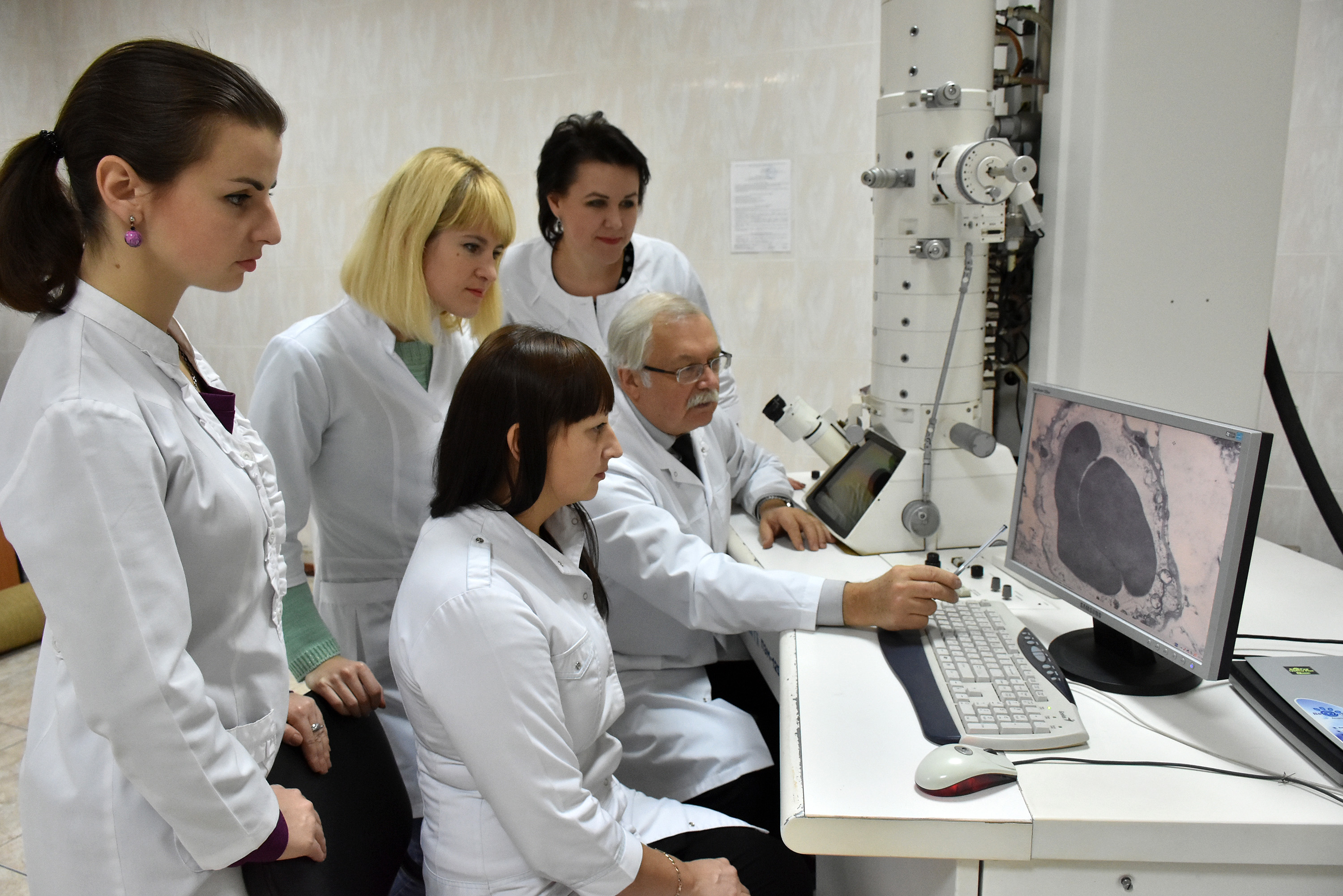 Науковці катедри гістології та ембріології Навчально-наукового інституту морфології Тернопільського національного медичного університету імені І. Я. Горбачевського проводять електронномікроскопічні дослідження на електронному мікроскопі, обладнаному цифровими системами виведення зображення високої роздільної здатності. Сидять: доцентка катедри Світлана Литвинюк, доктор біологічних наук, професор Костянтин Волков, стоять: старша викладачка катедри Соломія Крамар, старша лаборантка катедри Наталія Зикова, доктор біологічних наук, доцентка Зоя Небесна.